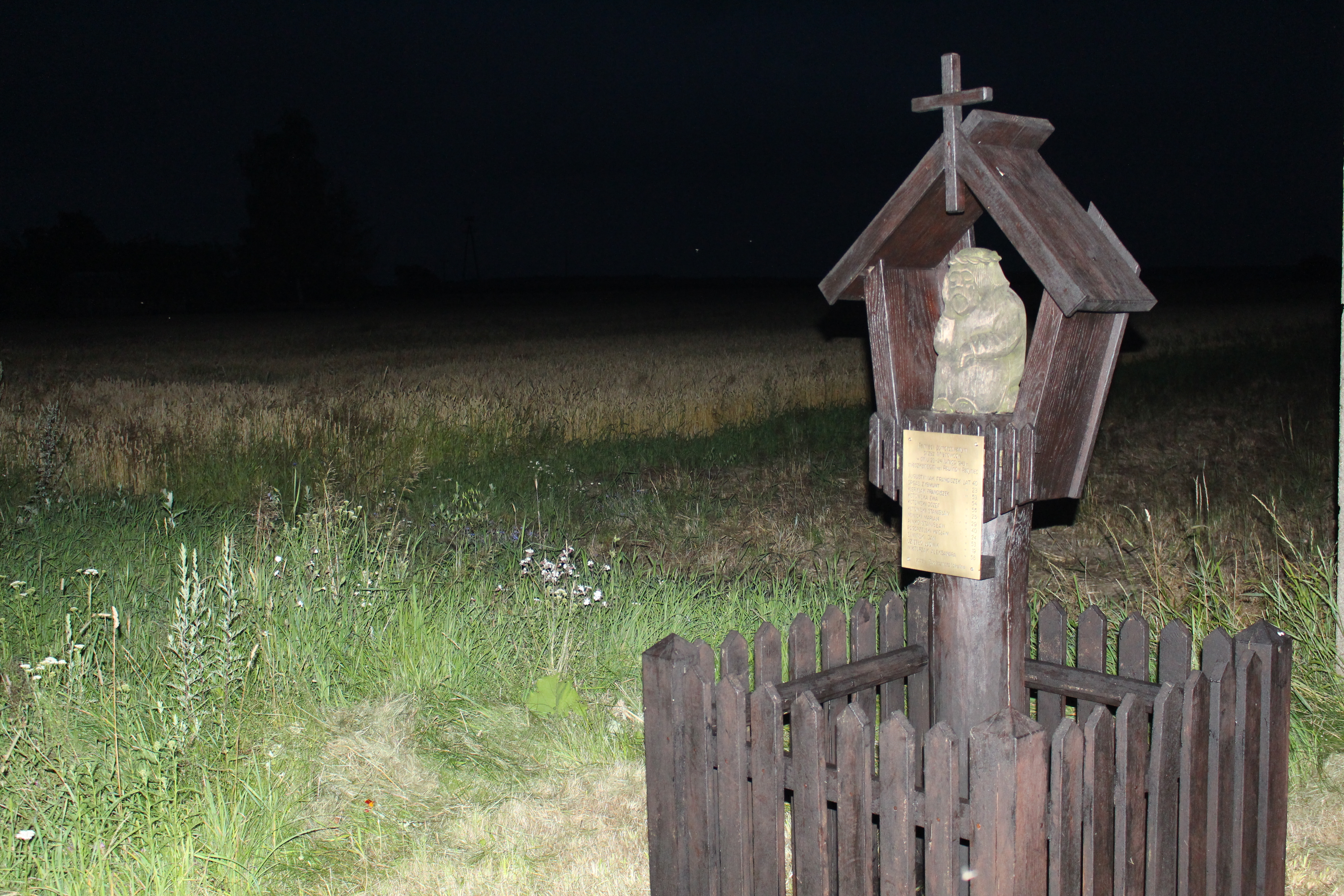 foto: Kazański Robert, Paulinów, odnowiona Kapliczka z rzeźbą Chrystusa Frasobliwego